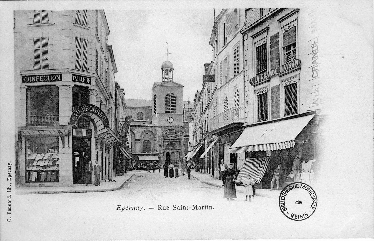 sur une vue ancienne.